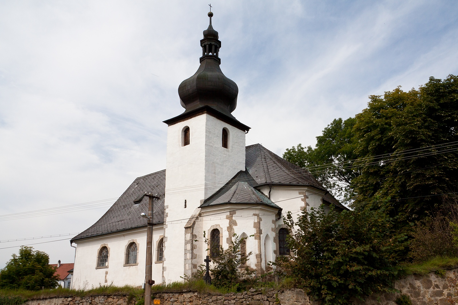 Kostel Nanebevzetí P. Marie (Staré Sedlo), střed obce, Staré Sedlo